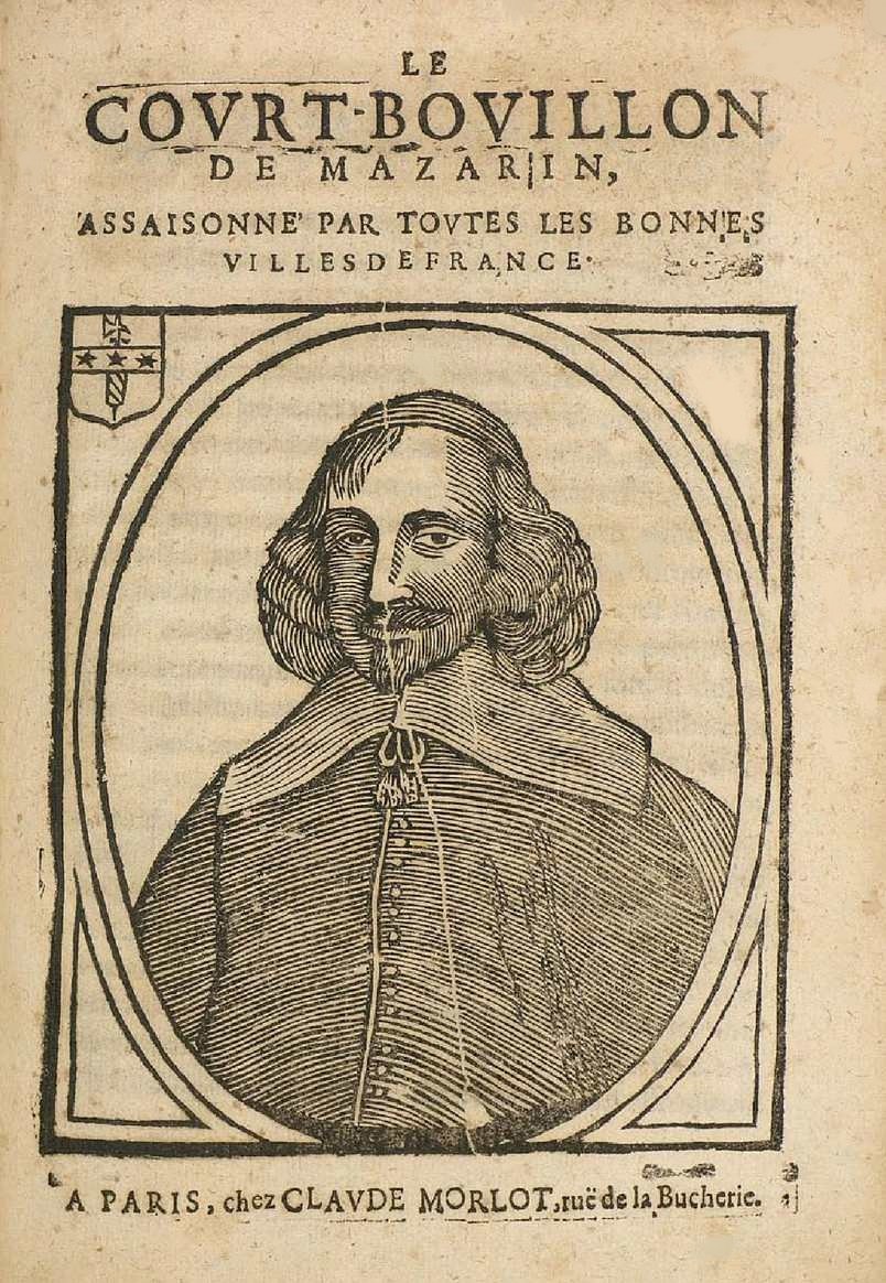 Rare mazarinade illustrée, publiée en 1649 de la collection de JP Boudet.